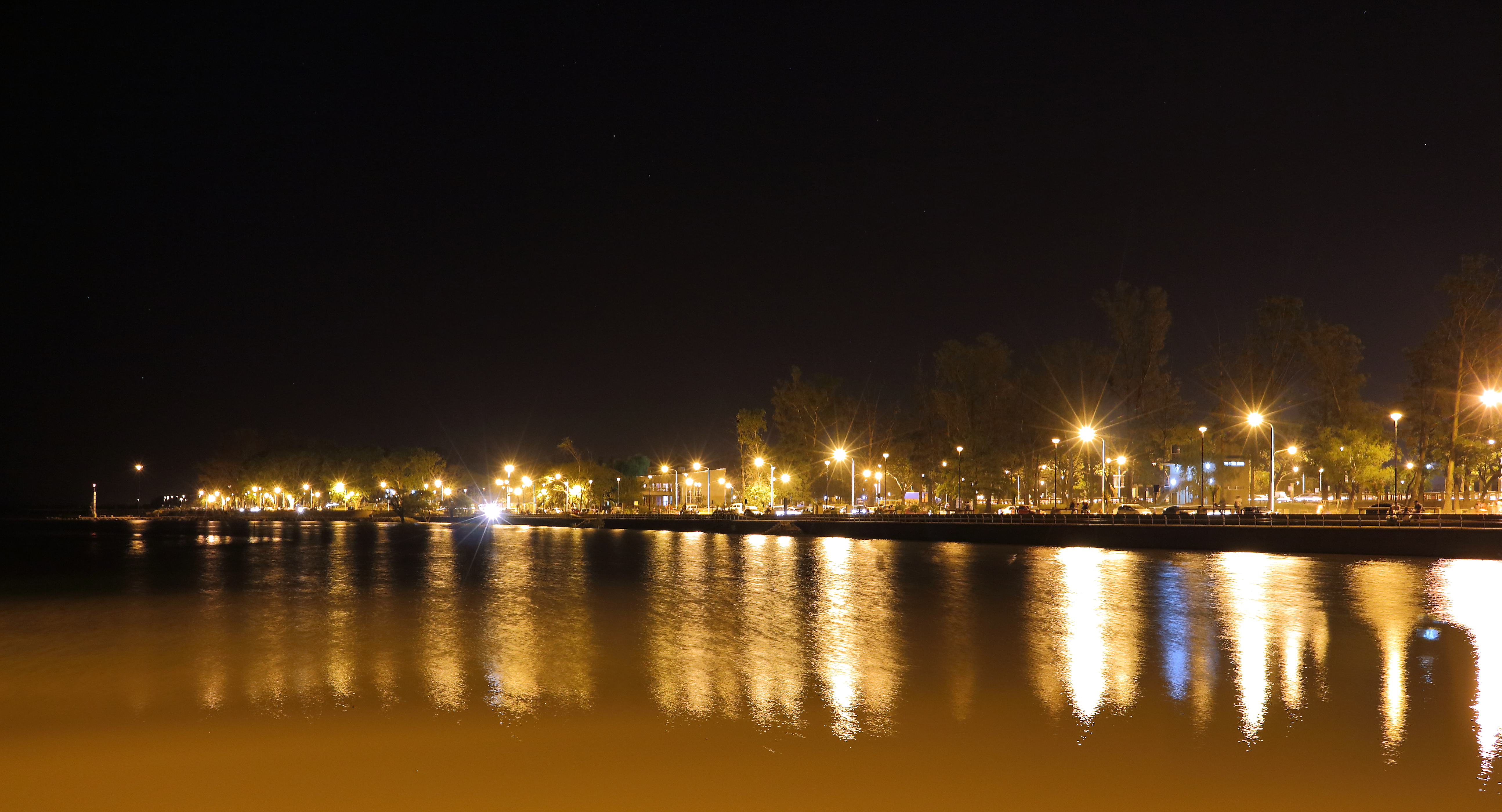 Foto tomada en la Costanera de Concordia, Entre Ríos, Argentina, desde uno de los miradores.